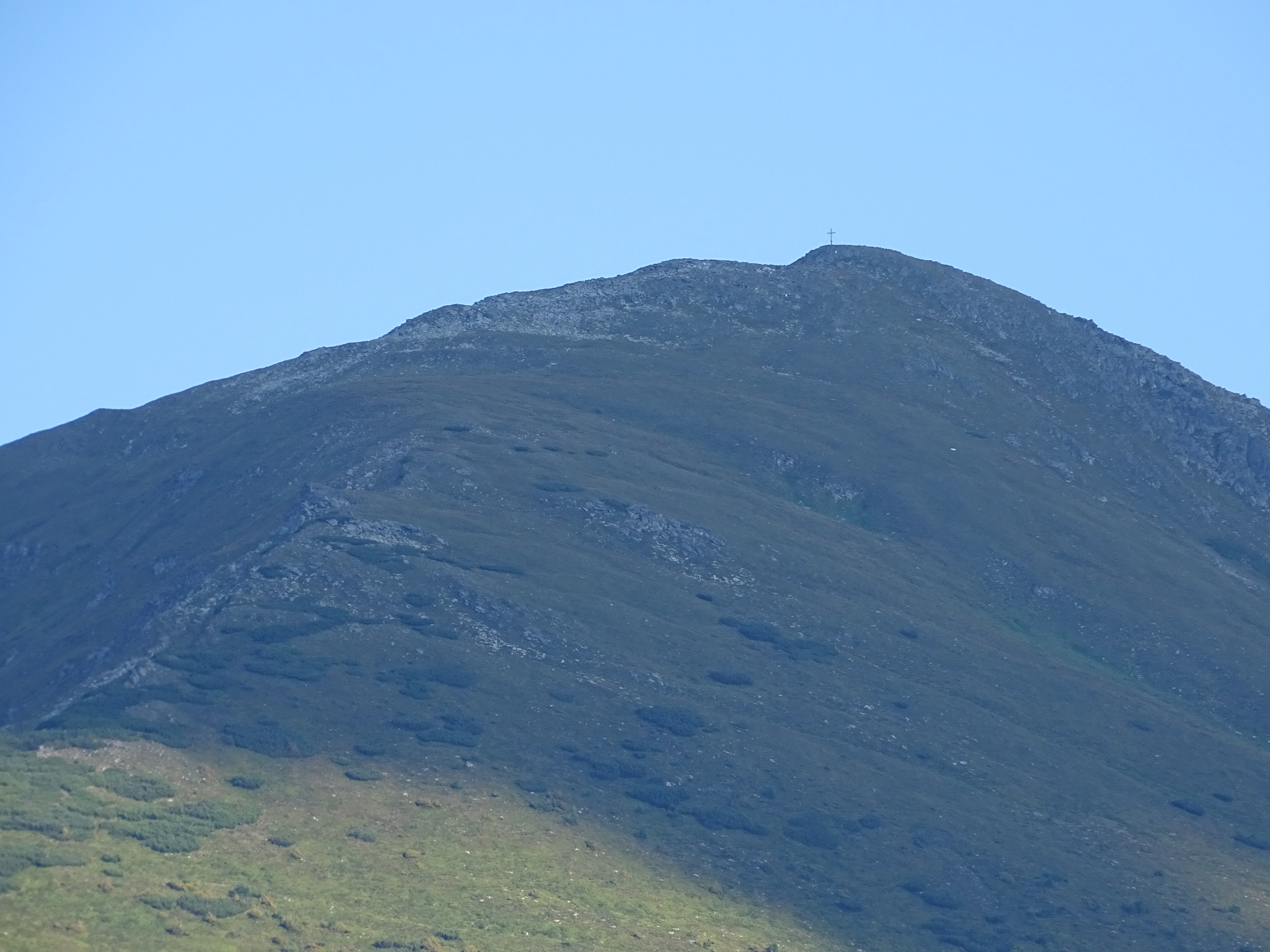 Der Gipfel des Hochrettelsteins an der Gemeindegrenze zwischen Aigen im Ennstal und Rottenmann.